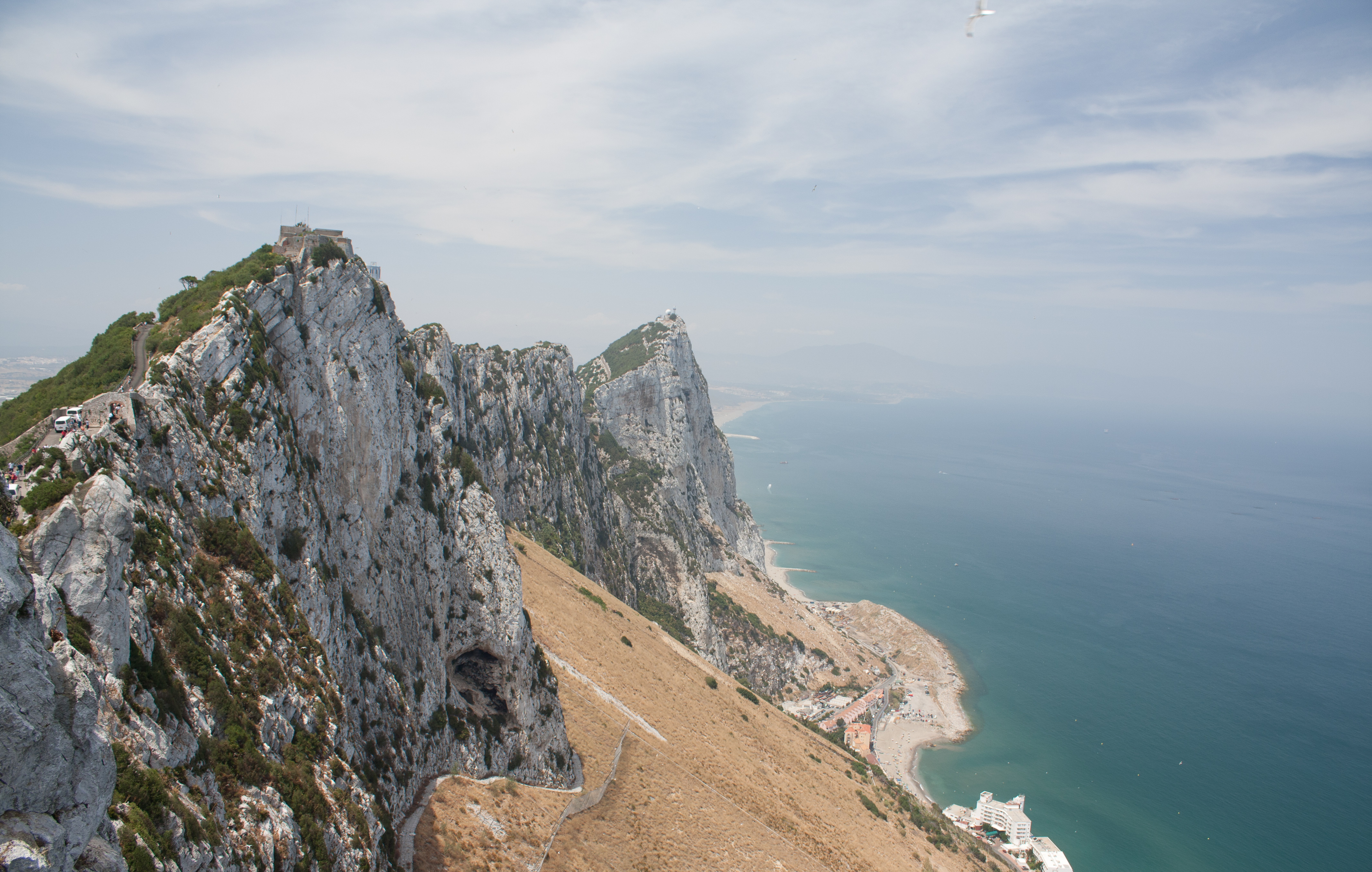 Gibraltar sand dune